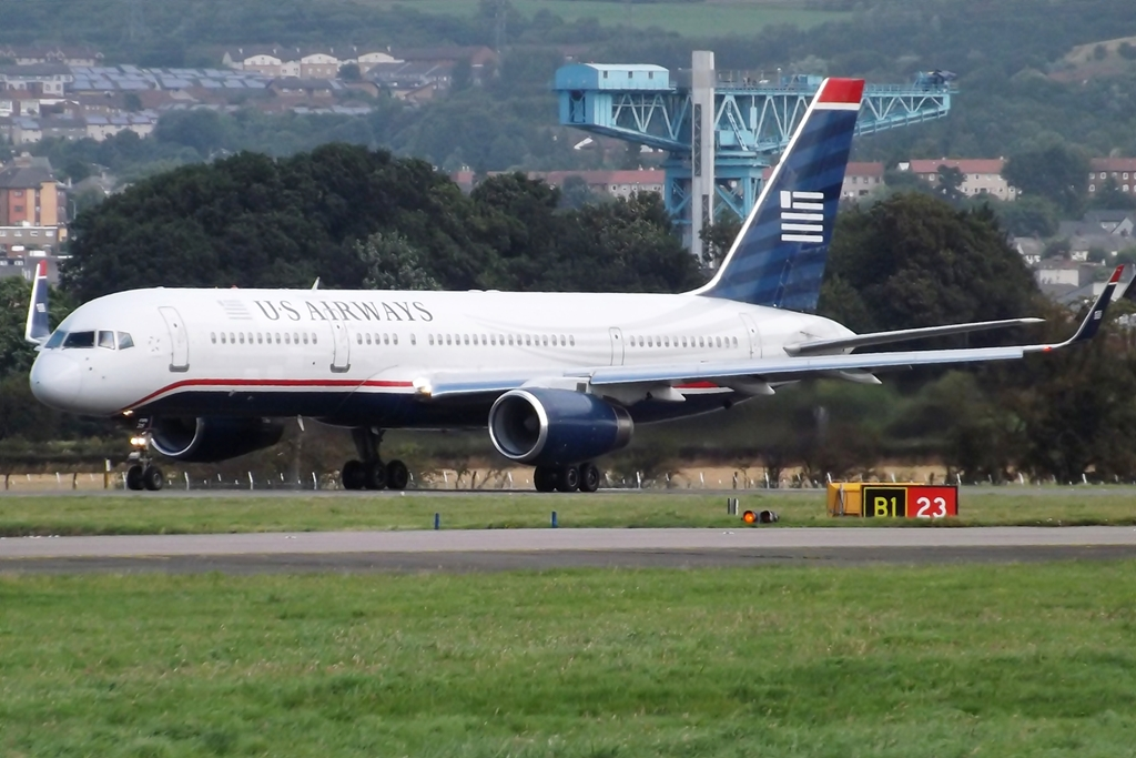 N205UW Boeing 757 US Airways